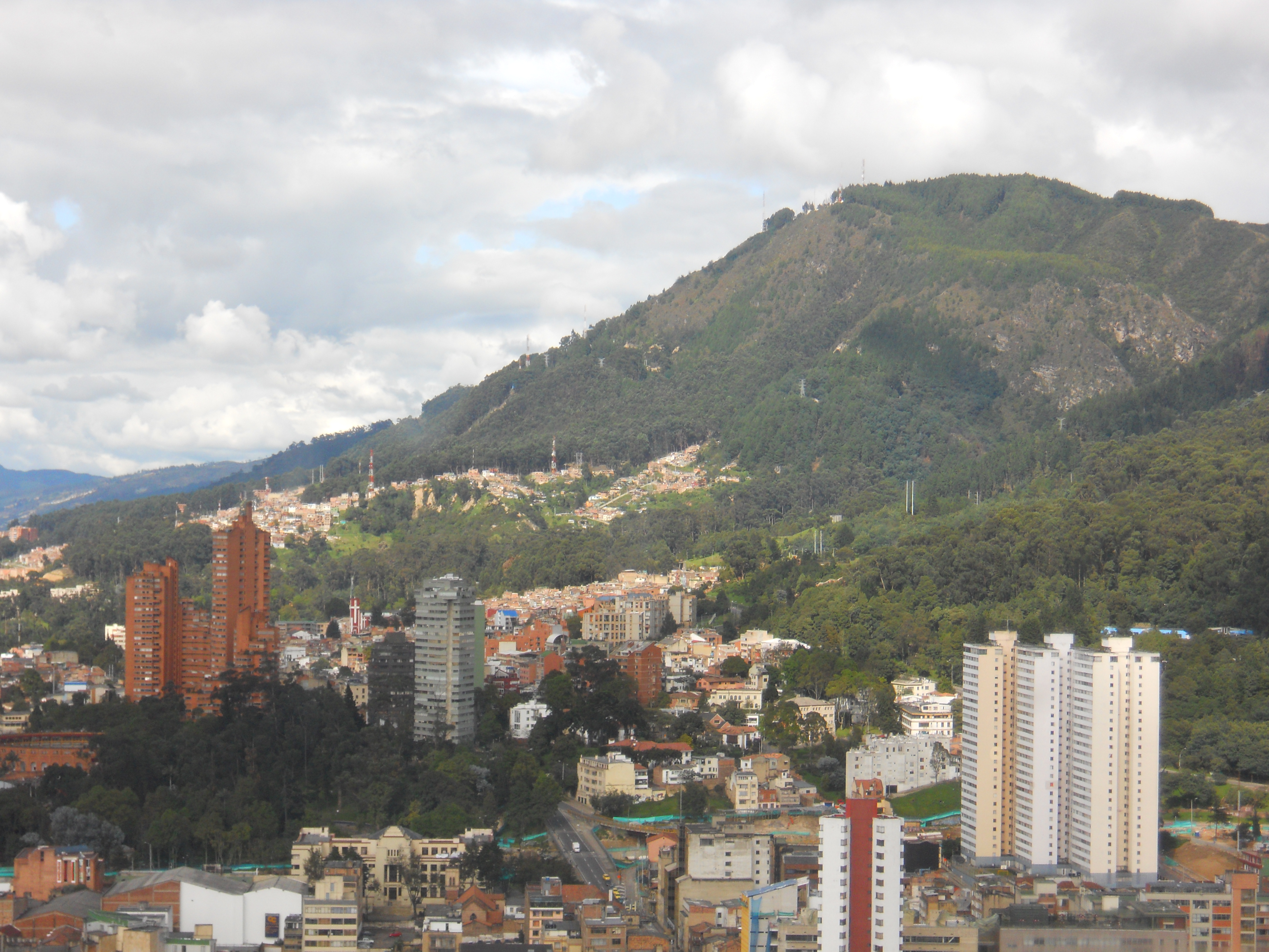 Cerro el Cable de Bogotá.